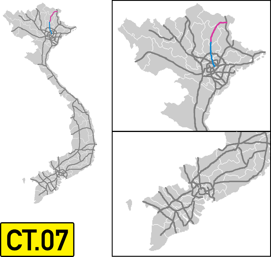 نقشه آزادراه شماره 07، موسوم به آزادراه هانوی - تا نگوین